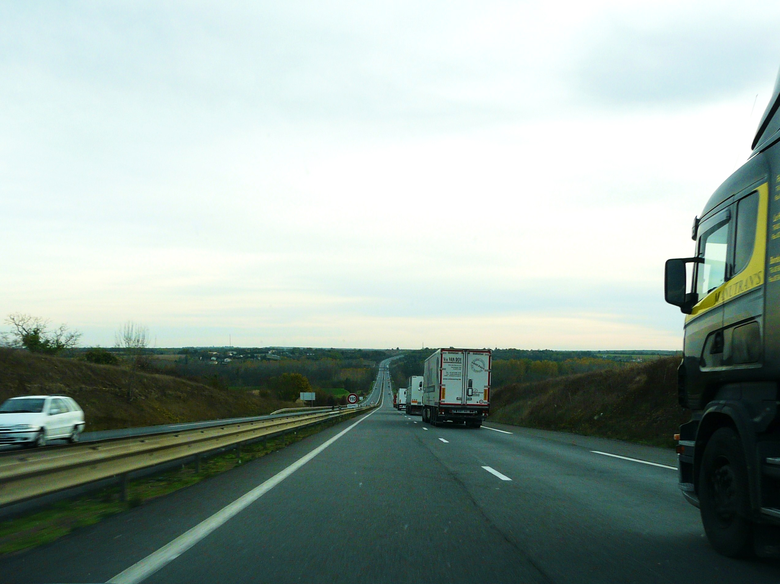 La route nationale 10 à Fontclaireau, Charente, France. Vue prise vers le sud et la vallée de la Charente.